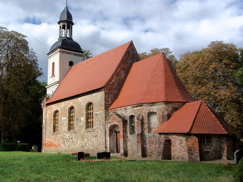 Kirche in Weitendorf, Landkreis Güstrow